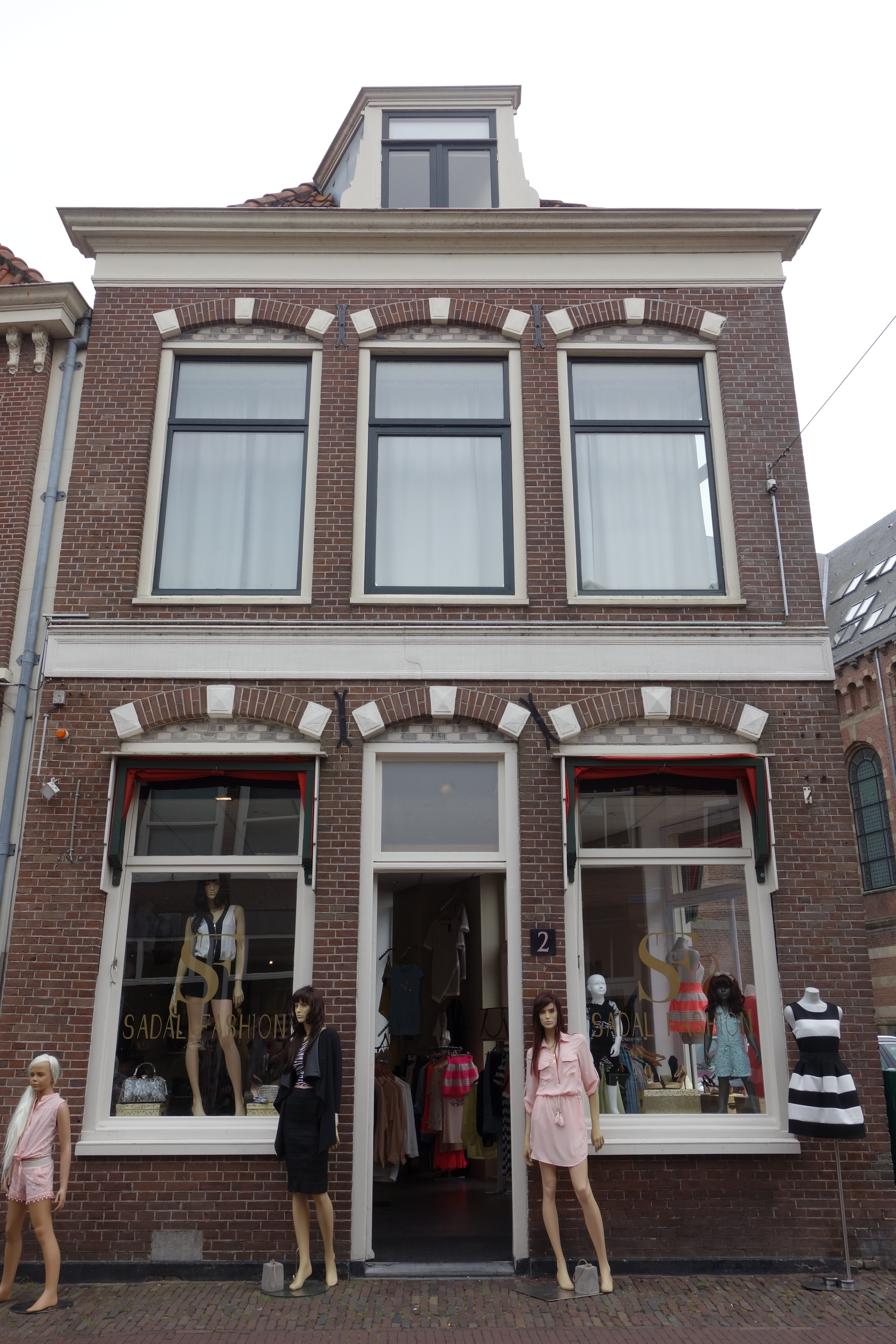 Gemeentelijk monument aan de Nieuwstraat nummer 2 in Hoorn. Pand is ontworpen door dezelfde architect als het naastgelegen pand op nummer 4.